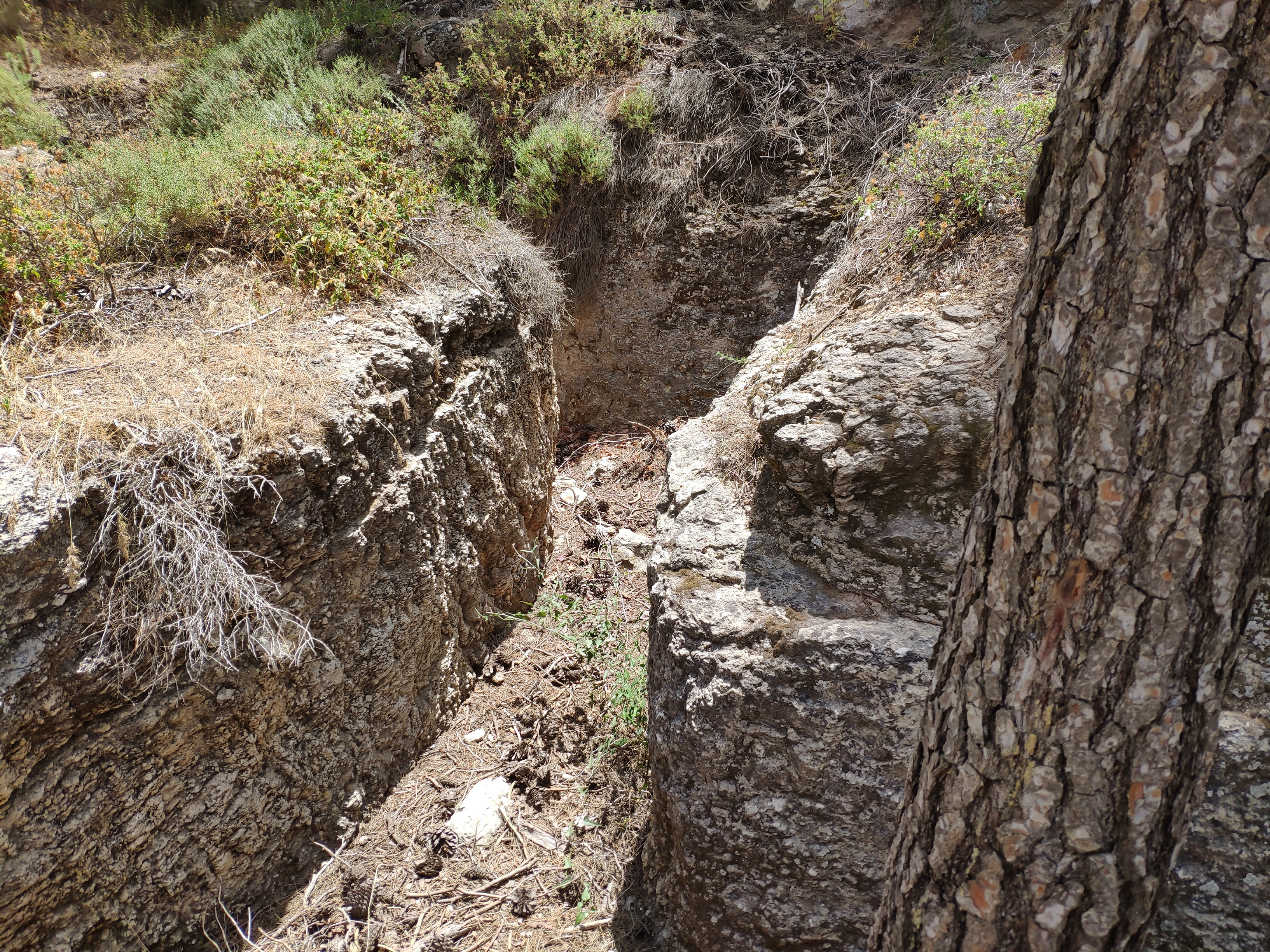 שוחות עות'מאניות ממלחמת העולם הראשונה באזור מצפה כרם, יער ירושלים